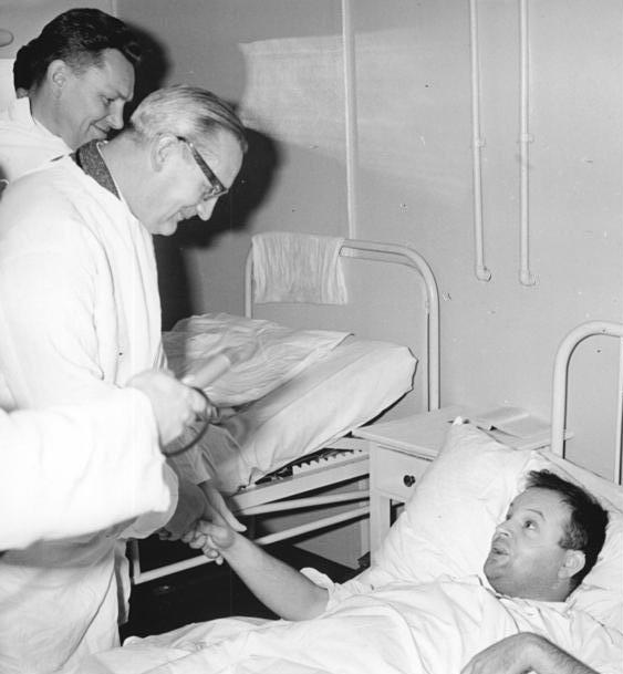 Zentralbild Karnitzki tre. 3.11.1964 Fürsorge umgibt die Verletzten des Eisenbahnunglücks bei Langhagen Den Verletzten des schweren Eisenbahnunglücks, das sich am 1.11.1964 in der Nähe des Bahnhofs Langhagen im Kreis Güstrow (Bezirk Schwerin) ereignet hatte und bei dem nach bisher vorliegenden Informationen 39 Menschen ums Leben kamen, wird alle erdenkliche Hilfe geleistet. UBz: Max Sefrin, Stellvertreter des Vorsitzenden des Ministerrates und Minister für Gesundheitswesen, der als Leiter einer Regierungskommission am Unfallort weilt (links vorn), am Krankenbett des Lektors (Rektors?) der Universität Rostock, Hans-Georg Witte.